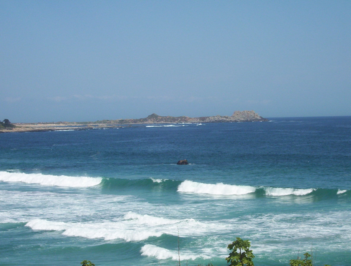 La playa Punta de Tralca, vista desde la Península de El Quisco. Provincia de San Antonio, V Región de Valparaíso, Chile.